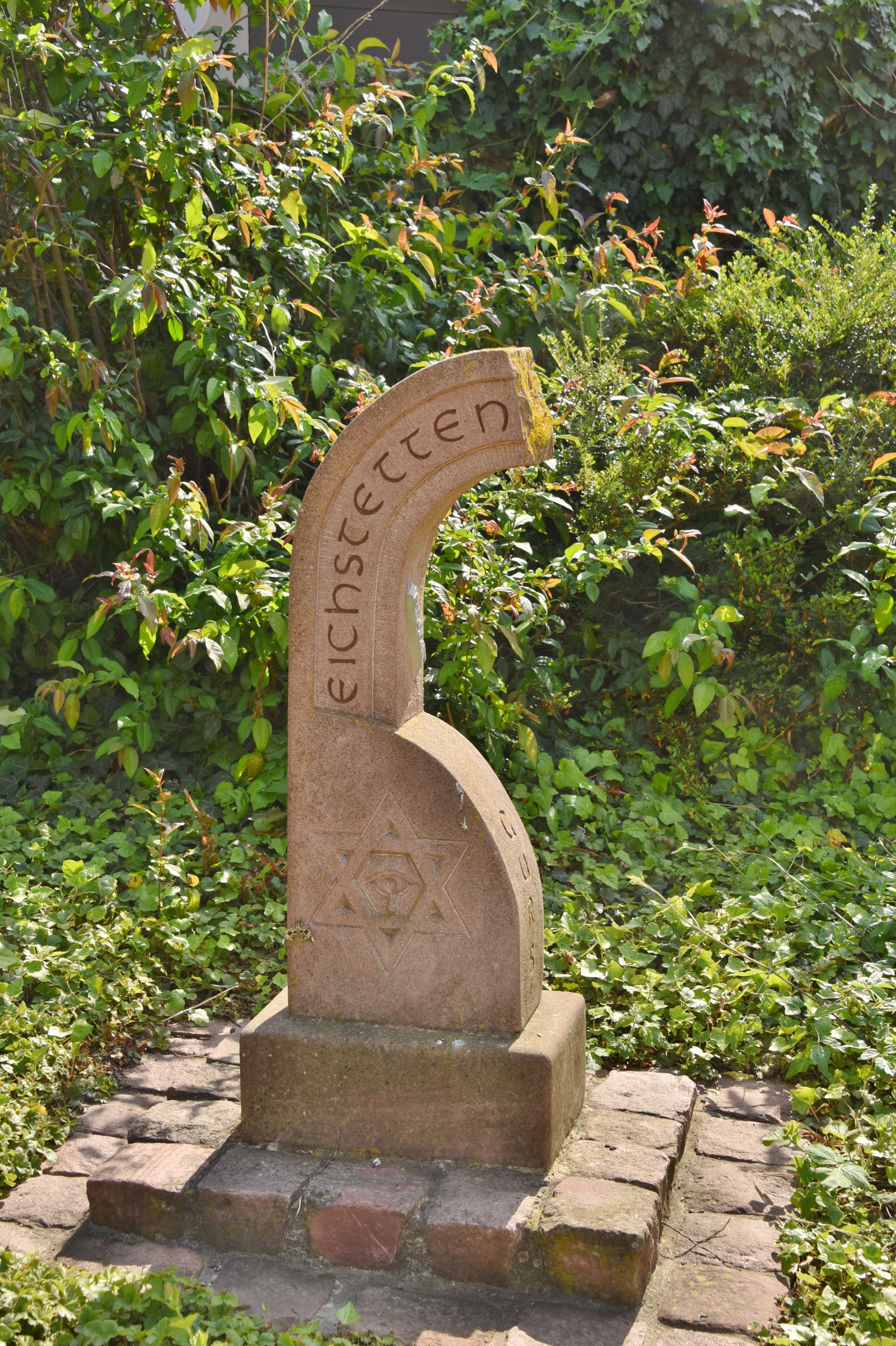 Gedenkstein für die Deportierten Juden und Jüdinnen